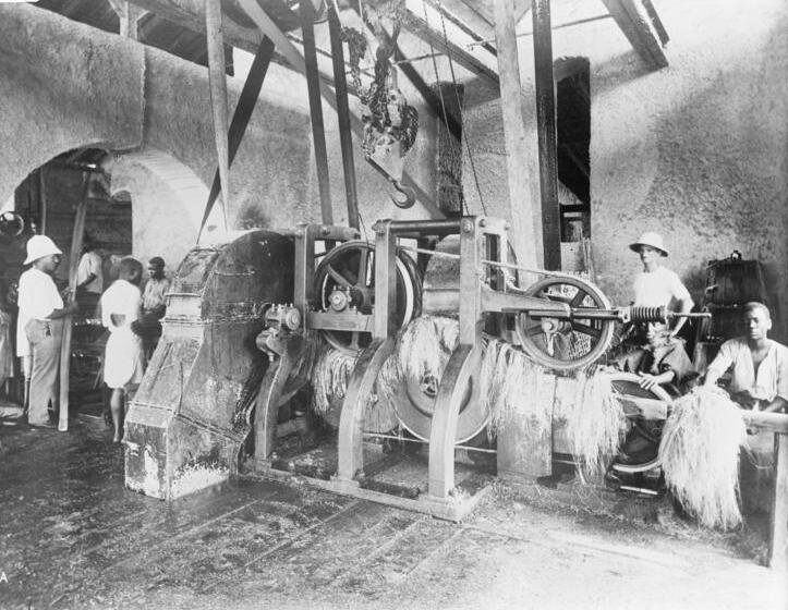 In der Sisalfabrik, Entfasern des Sisals